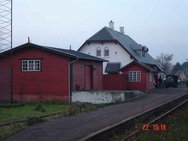 Lille Skensved station med varehus, enderampe og signalhus i forgrunden